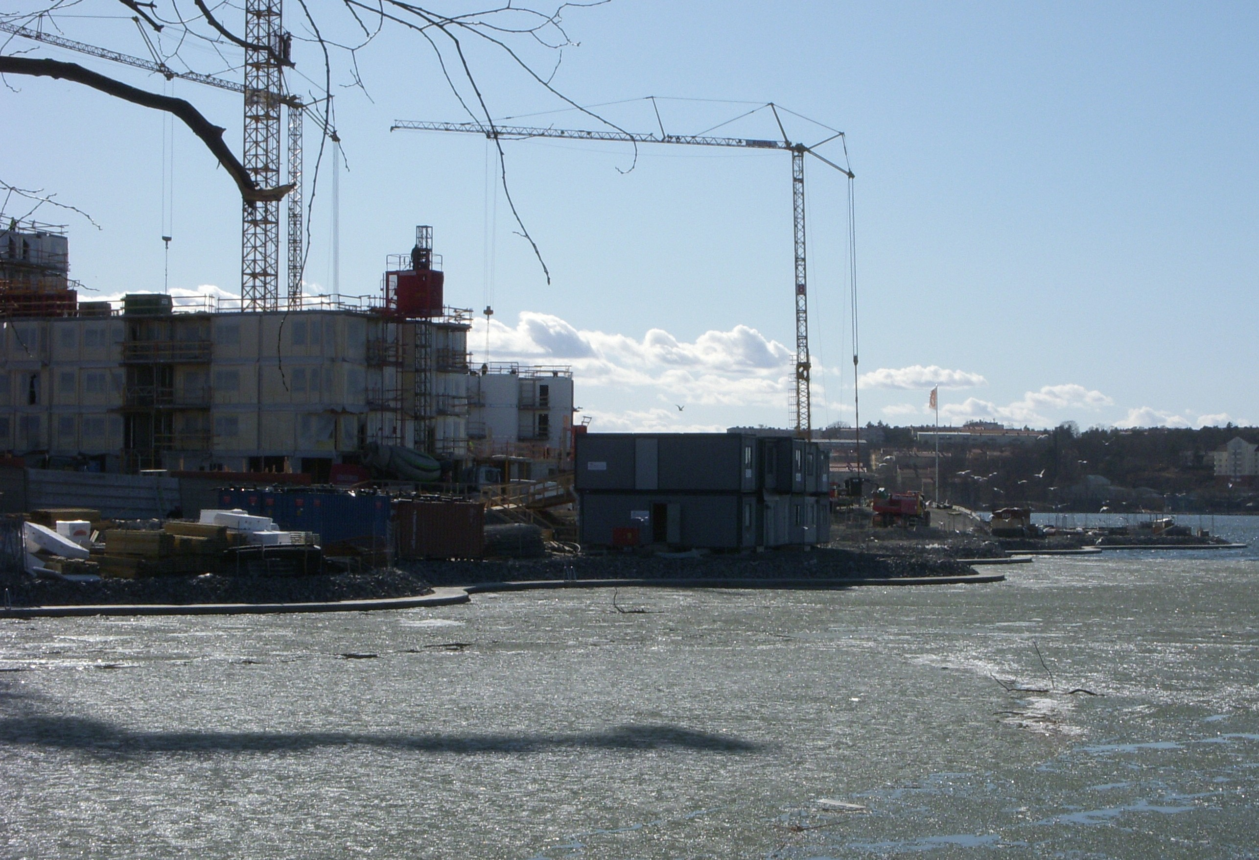 Hornsbergs strandpark, anläggningsarbetena